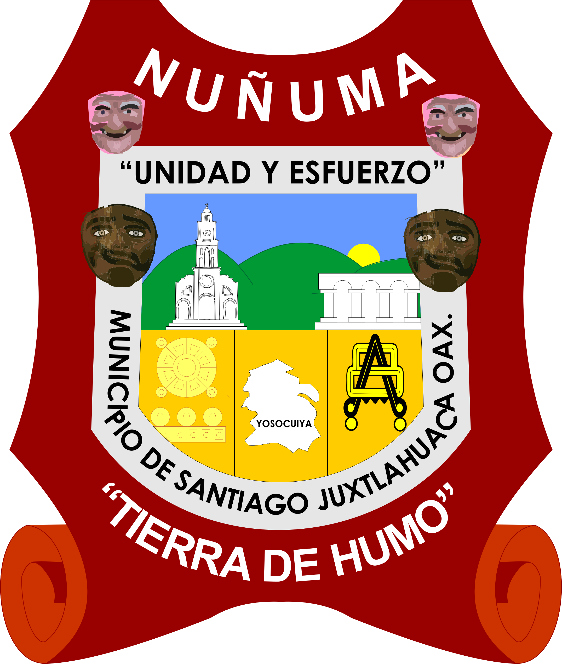 Descripción en lienzo de hules rojos, significando las luchas libertadoras de los mixtecos, así como su esencia ritual en la conformación de su estructura y organización social. En la parte superior la palabra "Ñu Ñu Ma" que en mixteco significa "Tierra de Humo" que es el nombre como se le conoce a la Mixteca. Al centro el lema "Unidad y Esfuerzo" que refleja el espíritu de unión y trabajo de sus hombres, enmarcado con el nombre del municipio, entre los cuales están las mascaras de la "Danza del Chilolo y del Rubio", que son las de mayor relevancia en el folclore de Juxtlahuaca, seguidas de las máscaras de la "Danza del Macho". La silueta del templo parroquial sobre el valle Verde y arcos del palacio municipal; significando la base y el soporte del esfuerzo de los habitantes de este pueblo de la tierra del sol, que despunta en los montes del "Agua Azul", descansando sobre un fondo amarillo que significa la abundante cosecha y la eterna búsqueda por la libertad sobre el cual se encuentra el glifo del año mixteco y la conjugación de sus raíces etimológicas; "En el gran llano Verde" y como le gustaron ponerle "Llano del Conejo".